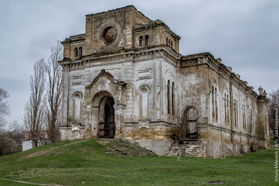 В 1892 году был построен католический храм Пресвятой Троицы. Храм был построен из распространенного в Северном Причерноморье известняка. Летом и осенью 1919 года, одесские немцы - колонисты организовали восстание против продразверстки и мобилизации в Красную Армию. После вступления на юг Украины войск армии Деникина, немцы образовали особый колонистский батальон, который значительно ослабил силы красных. После поражения сопротивления, собор был закрыт. Но его современное состояние значительно хуже. В советское время здание использовалось как зернохранилище, но позже в здании произошел сильный пожар,и его полностью уничтожил - крыша провалилась, остались только стены и колонны. Сейчас собор используется местным интернатом как хранилище угля.